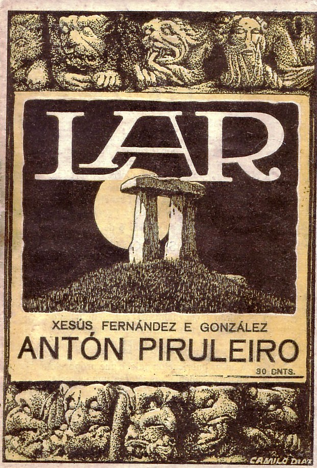 07 Antón Piruleiro. Xesús Fernández González. Lar. 1925.jpg